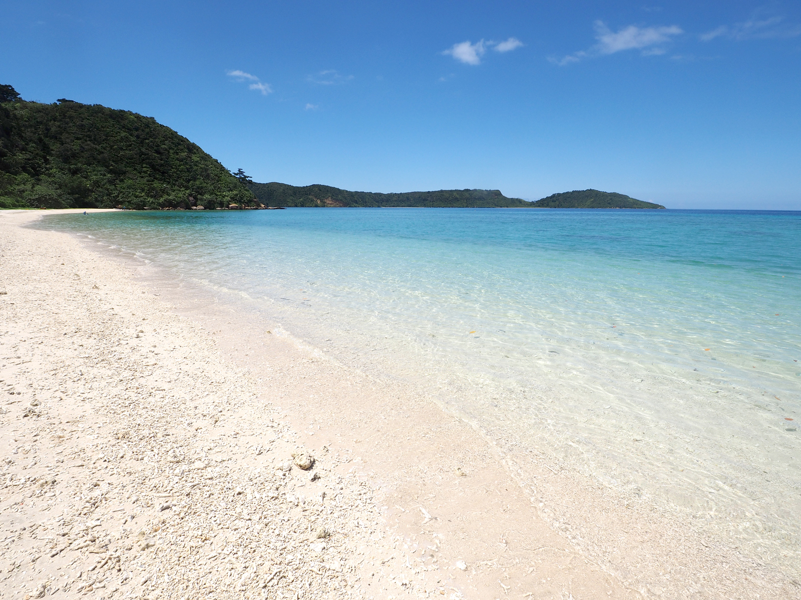 イダの浜（沖縄県八重山郡竹富町西表島船浮）